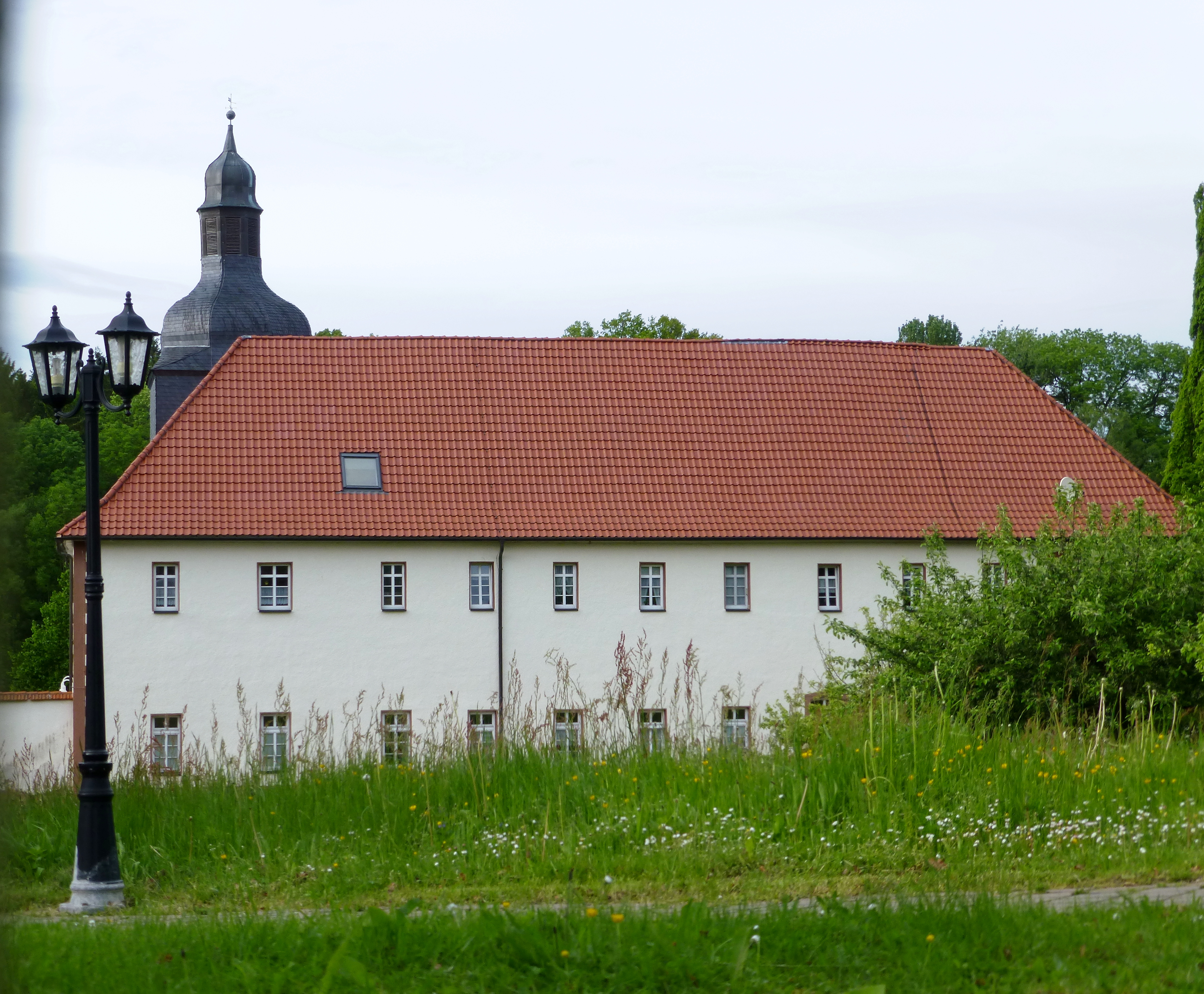 Südflügel des ehem. Klosters Beuren